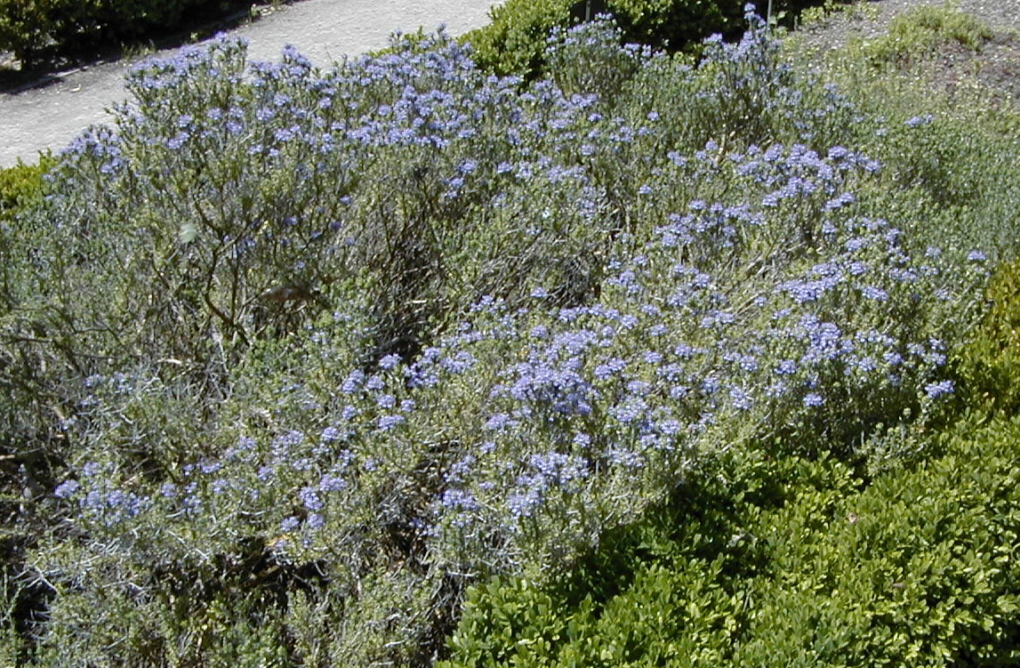 Thymbra capitata. Real Jardín Botánico de Madrid.